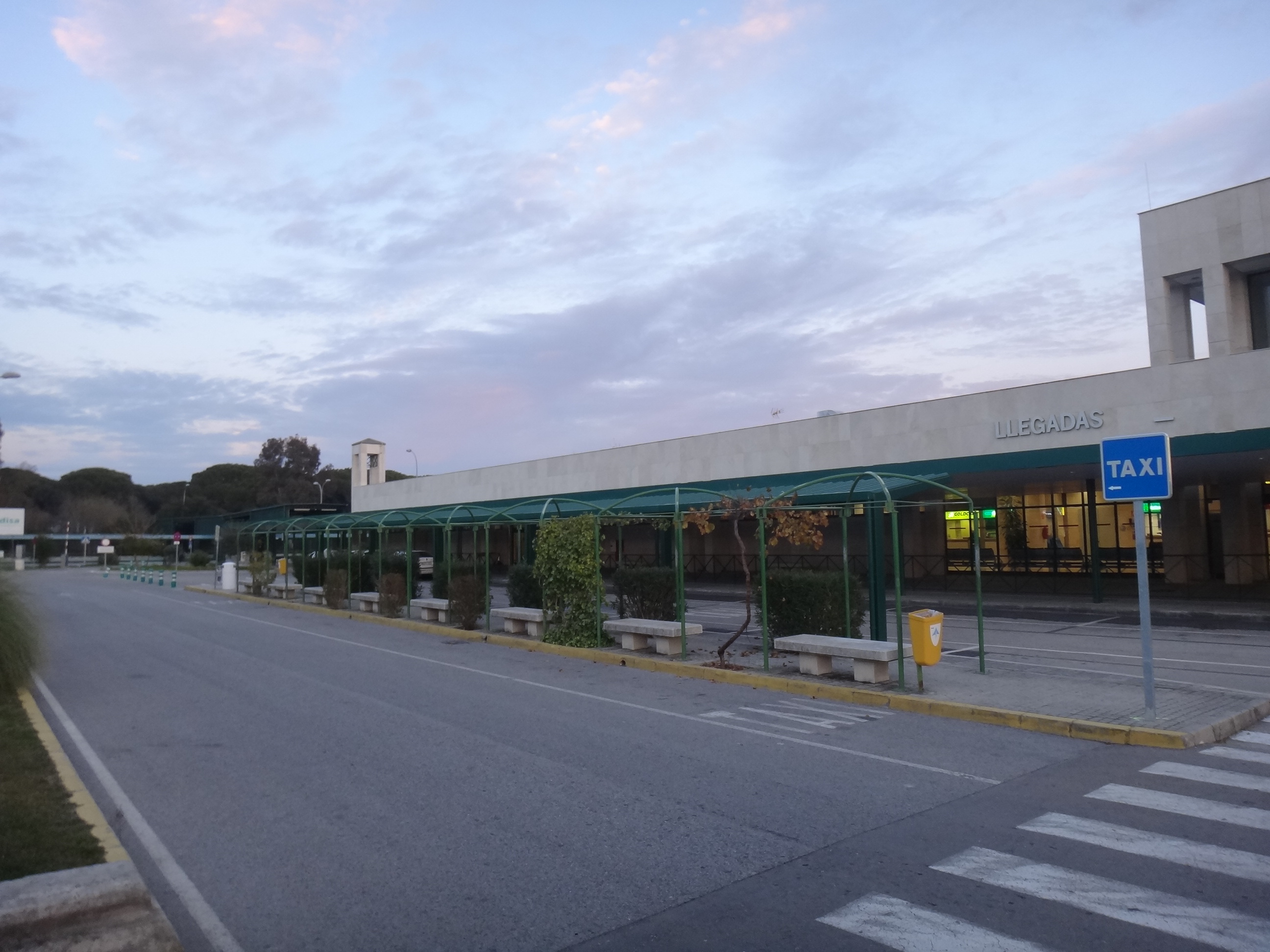 Aeropuerto de Jerez (España)